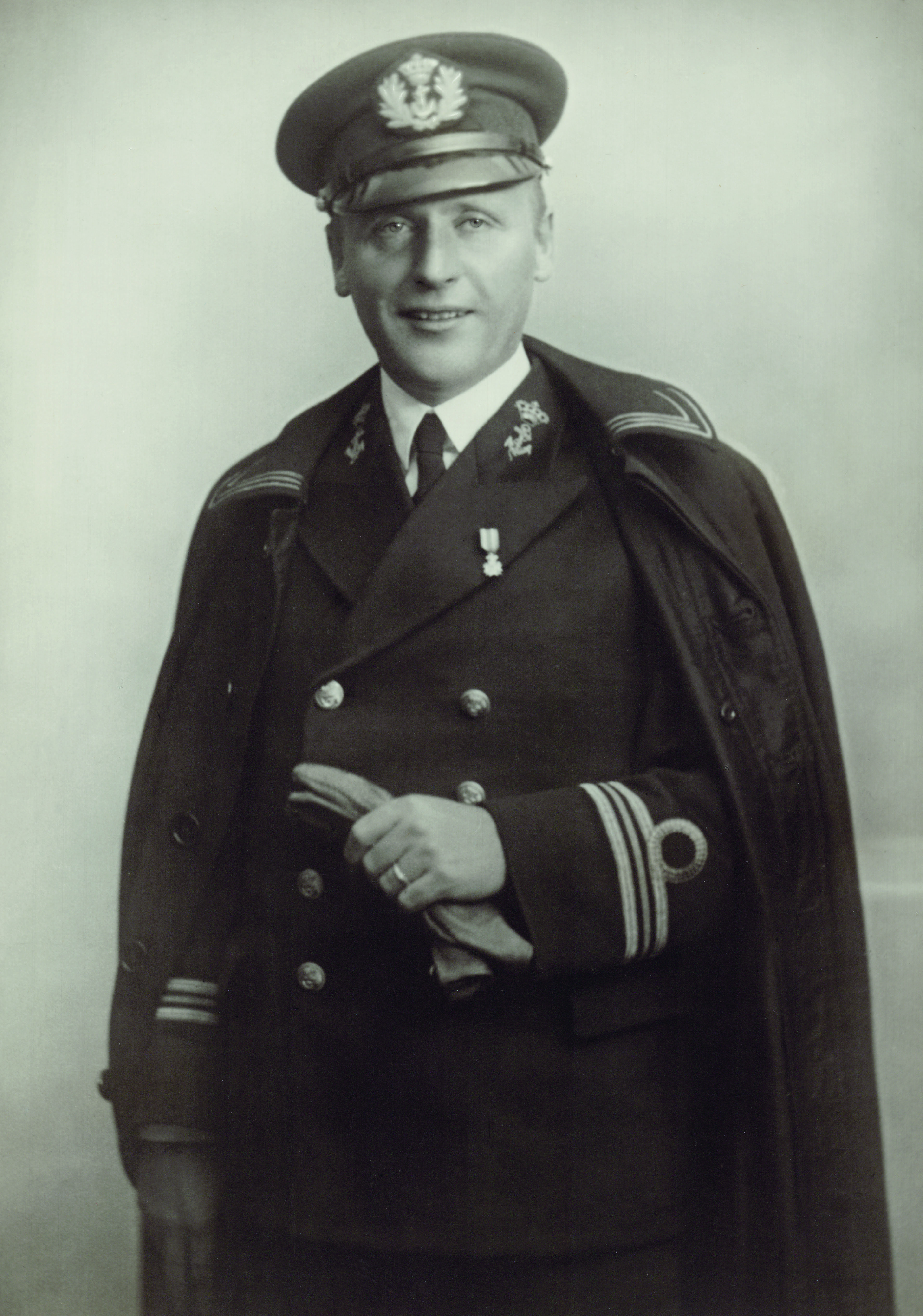 Antonie Jacobus (Anton) Bussemaker (1900-1941) was een Nederlands marineofficier die is onderscheiden met de Militaire Willems-Orde.